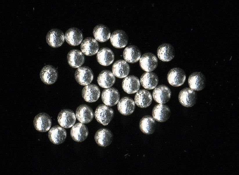 森下仁丹株式会社が製造・販売する医薬部外品「仁丹」